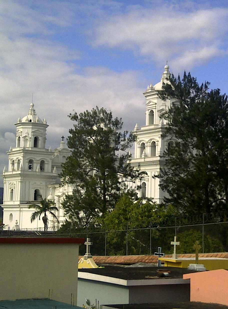 Vista lateral de la Basílica de Esquipulas desde el cementerio general de la ciudad.